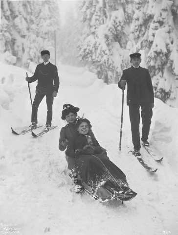 Sledding and skiing in Frognerbakken, Oslo, Norway